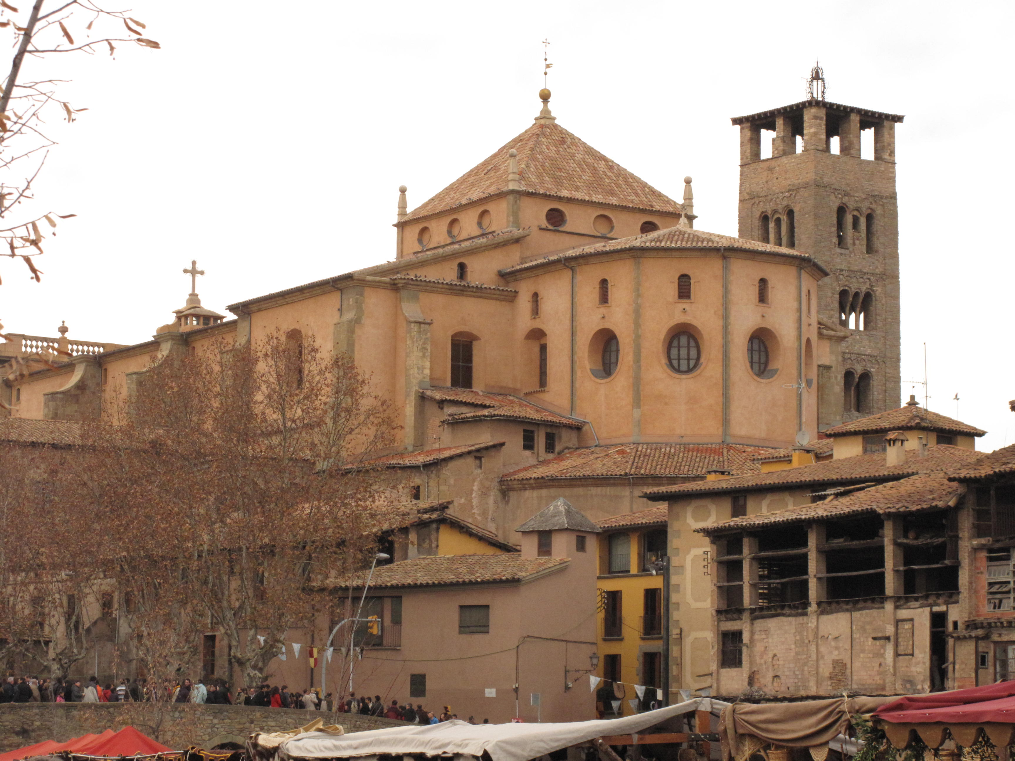 Catedral de Sant Pere (Vic)